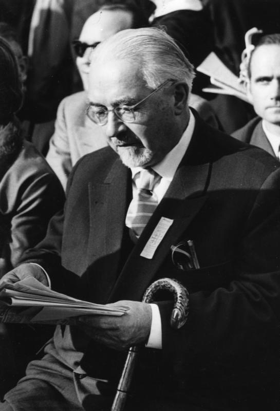 7.-12.8.1956 anläßlich des Deutschen Evangelischen Kirchentages in Frankfurt/Main Stellv. Ministerpräsident Otto Nuschke (Sowjet Zone)